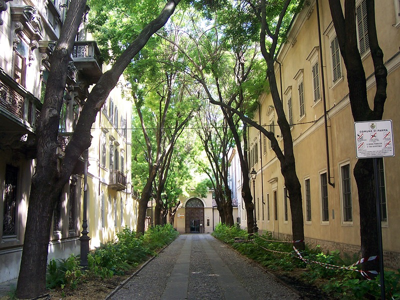 Parma - Viale che conduce alla Camera della Badessa